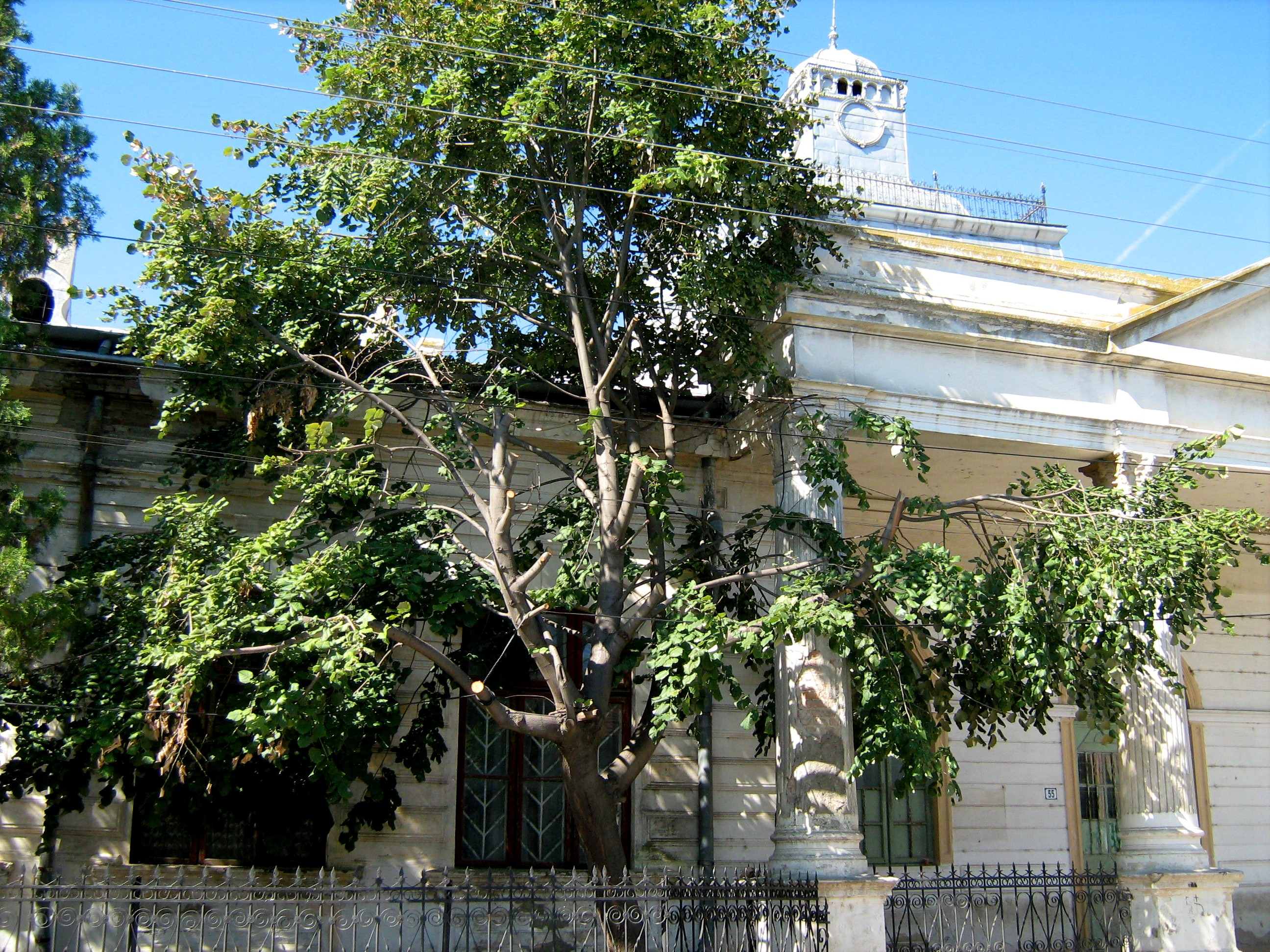 Școală